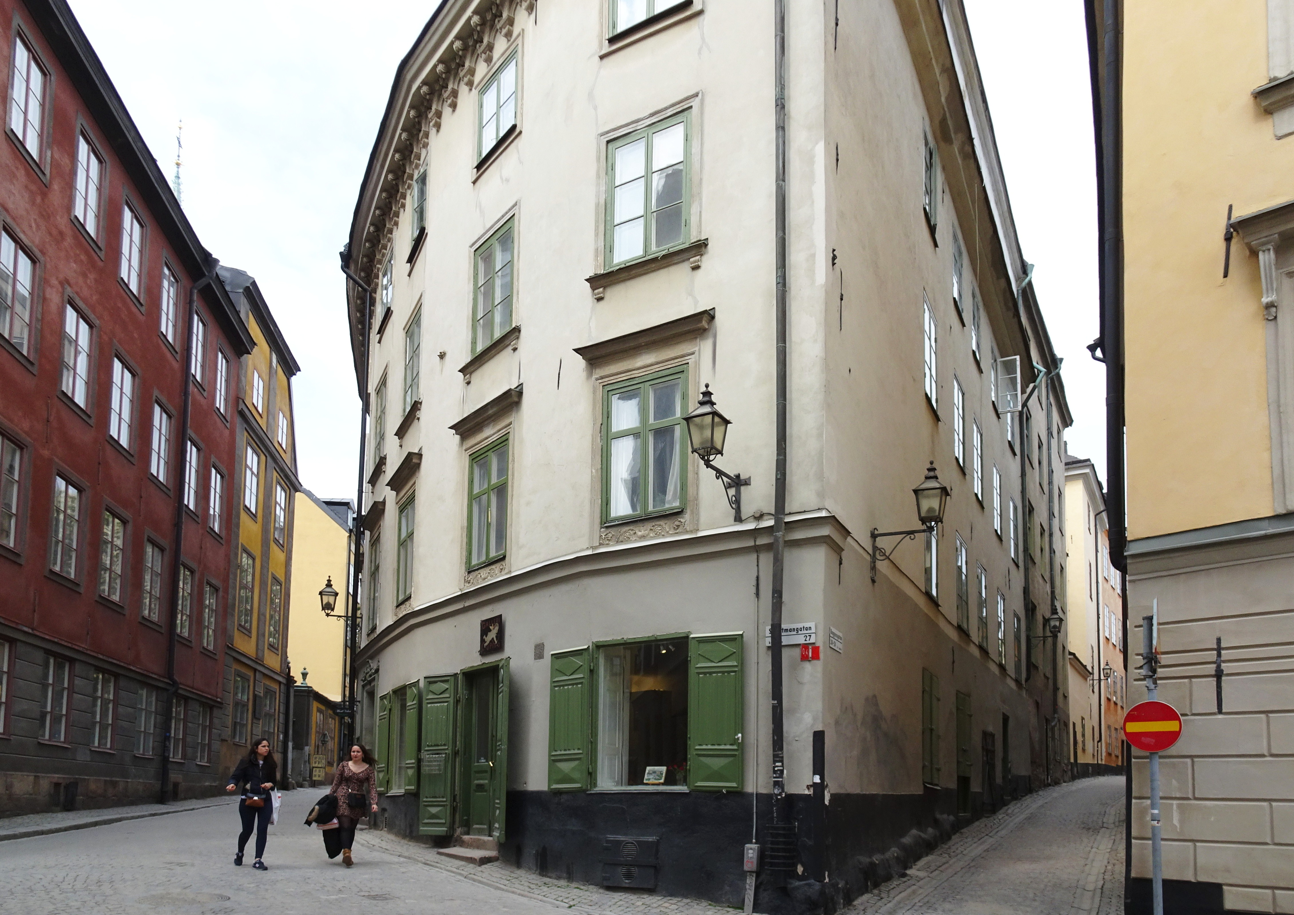 Kvarteret Cupido söderifrån